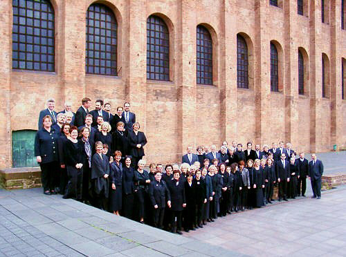 Trierer Bachchor